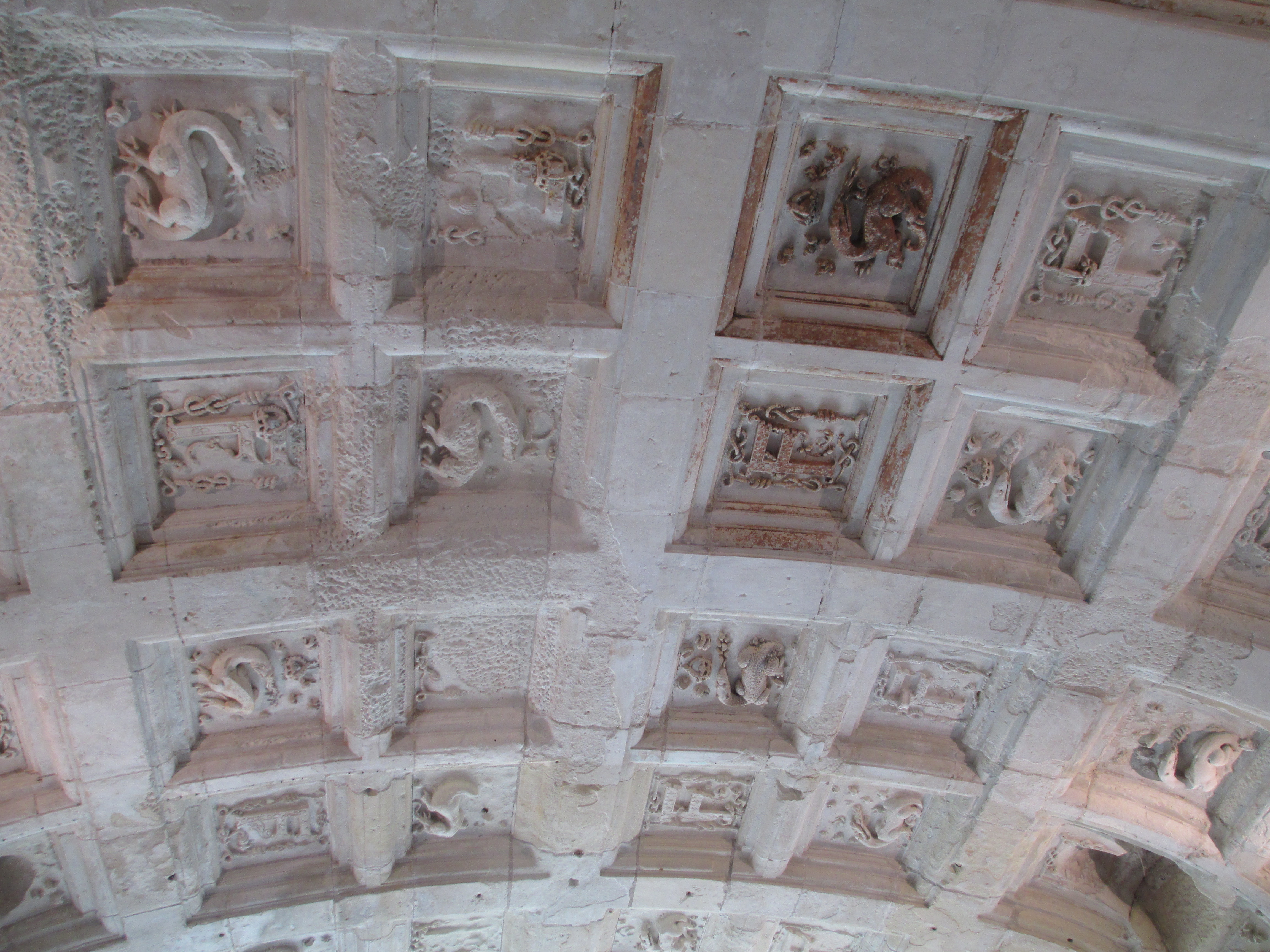 תבליטי סלמנדרות בטירת שאמבור